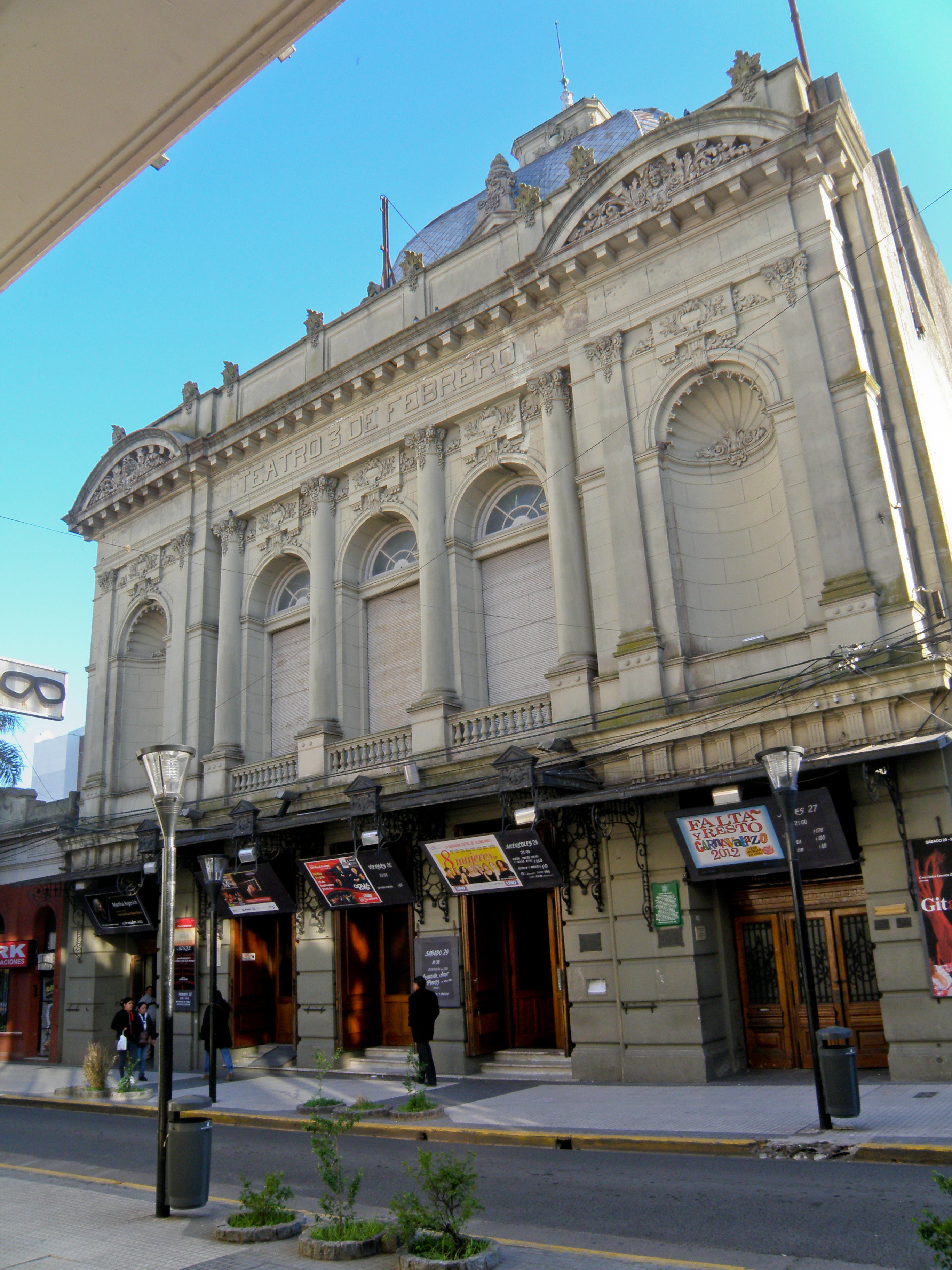 El 9 de Diciembre de 1851 se da comienzo a la edificación del primer teatro, dispuestas por el General Justo José de Urquiza. La inauguración tuvo lugar el domingo 8 de agosto de 1.852. El gobernador delegado era por entonces Antonio Crespo, quien en su discurso señala el reconocimiento a la Batalla de Caseros para su denominación "3 de Febrero".